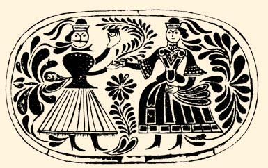 Mulató pár motívuma egy tükrösön 1870-es évek